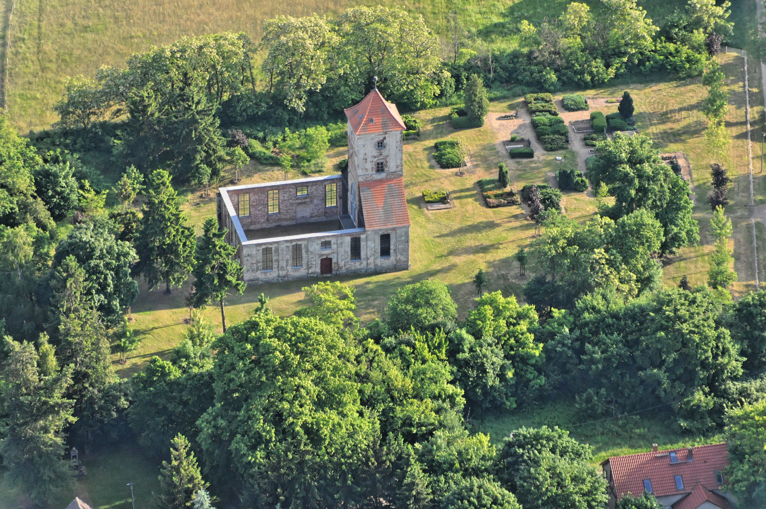 die Kirchruine in Bartschendorf beim Überführungsflug vom Flugplatz Nordholz-Spieka über Lüneburg, Potsdam zum Flugplatz Schwarzheide-Schipkau